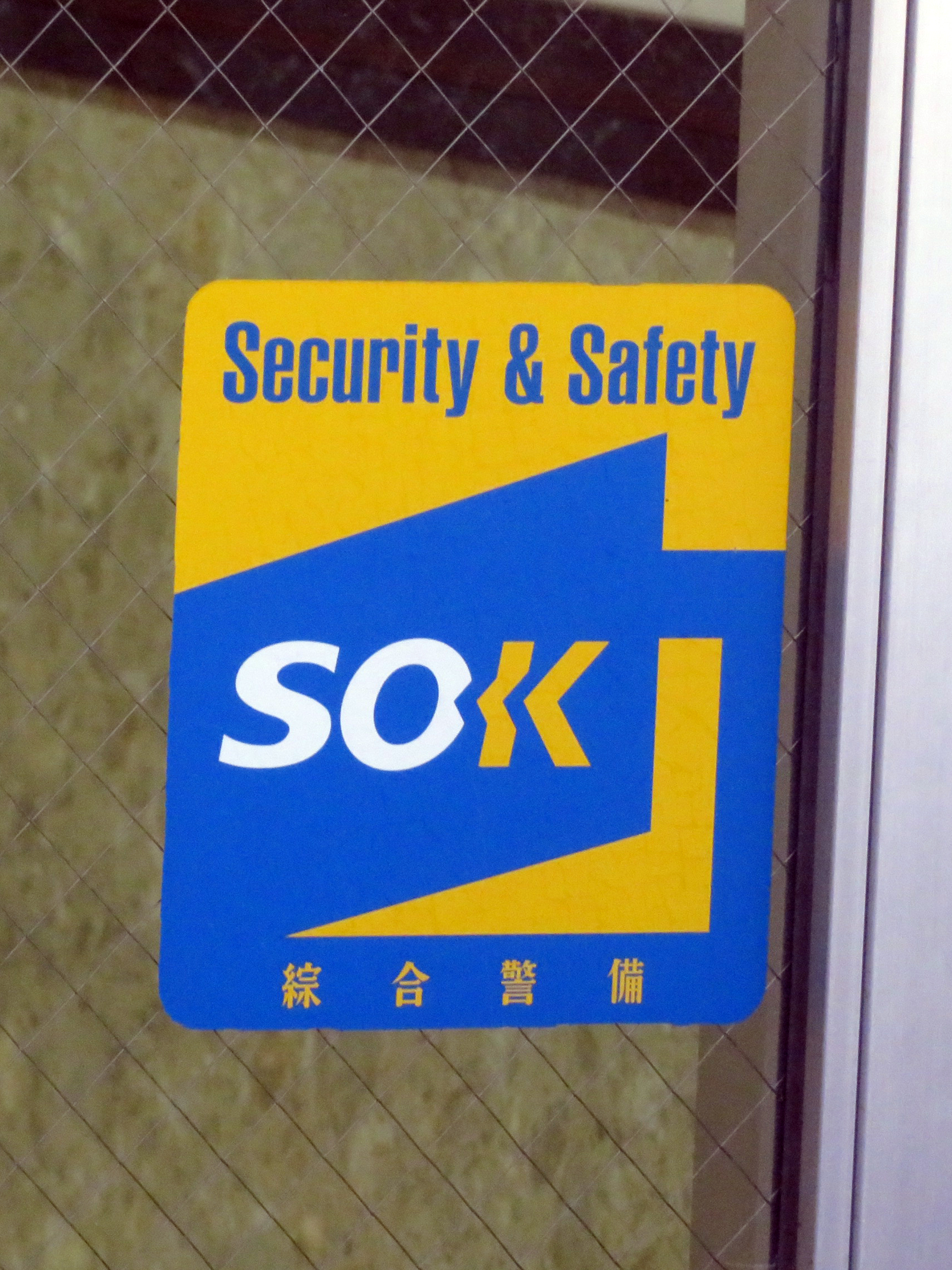 SOK (現：ALSOK)のシールを撮影